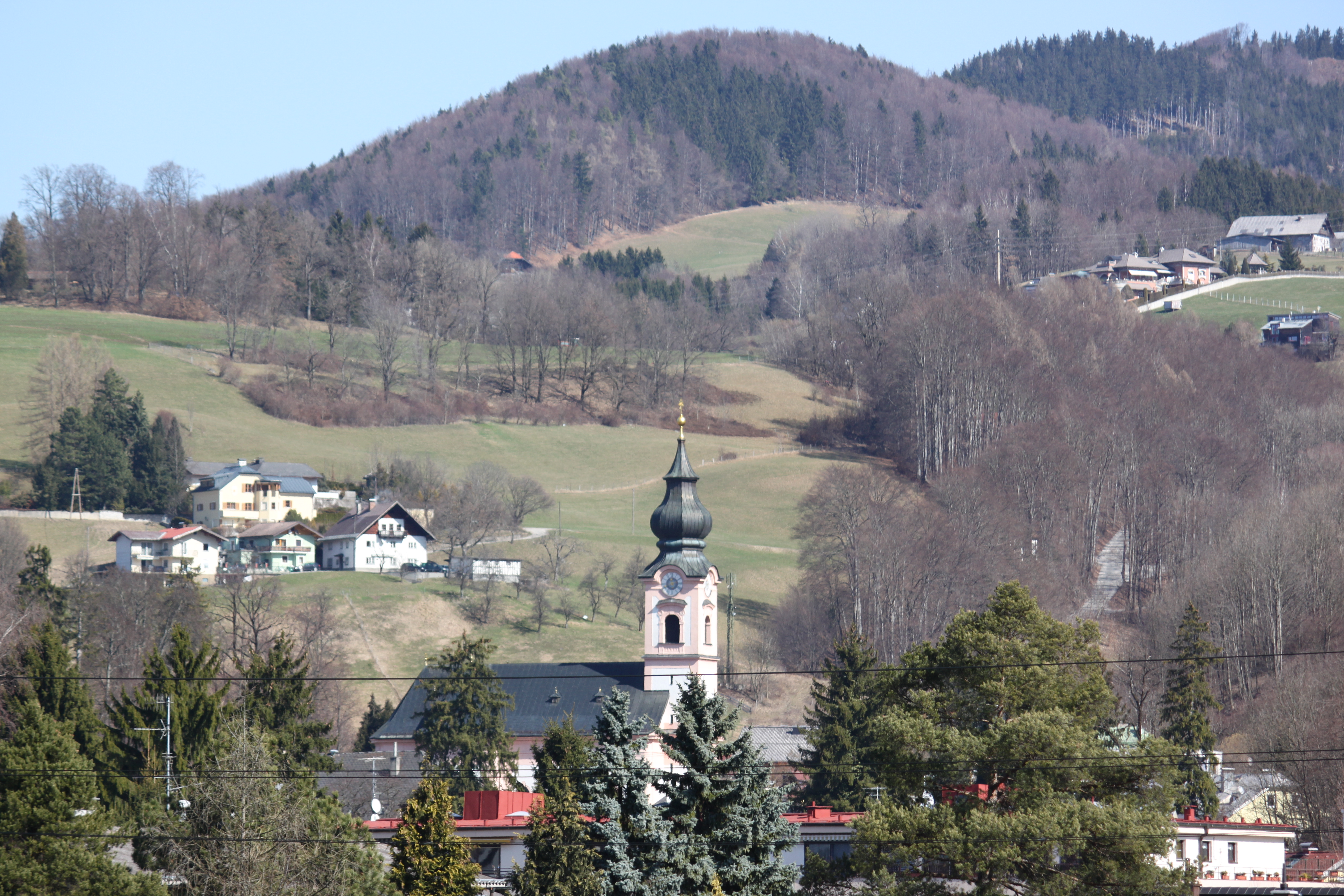 Kath. Pfarrkirche Gnigl, hl. Michael mit Friedhof